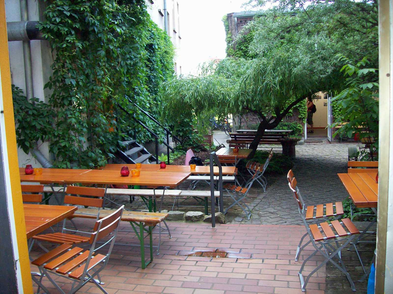 Wikipedia-Stammtisch in der Berliner Brotfabrik